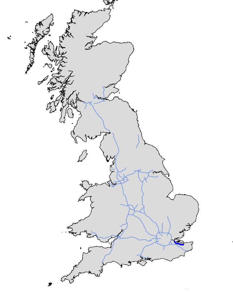 M2